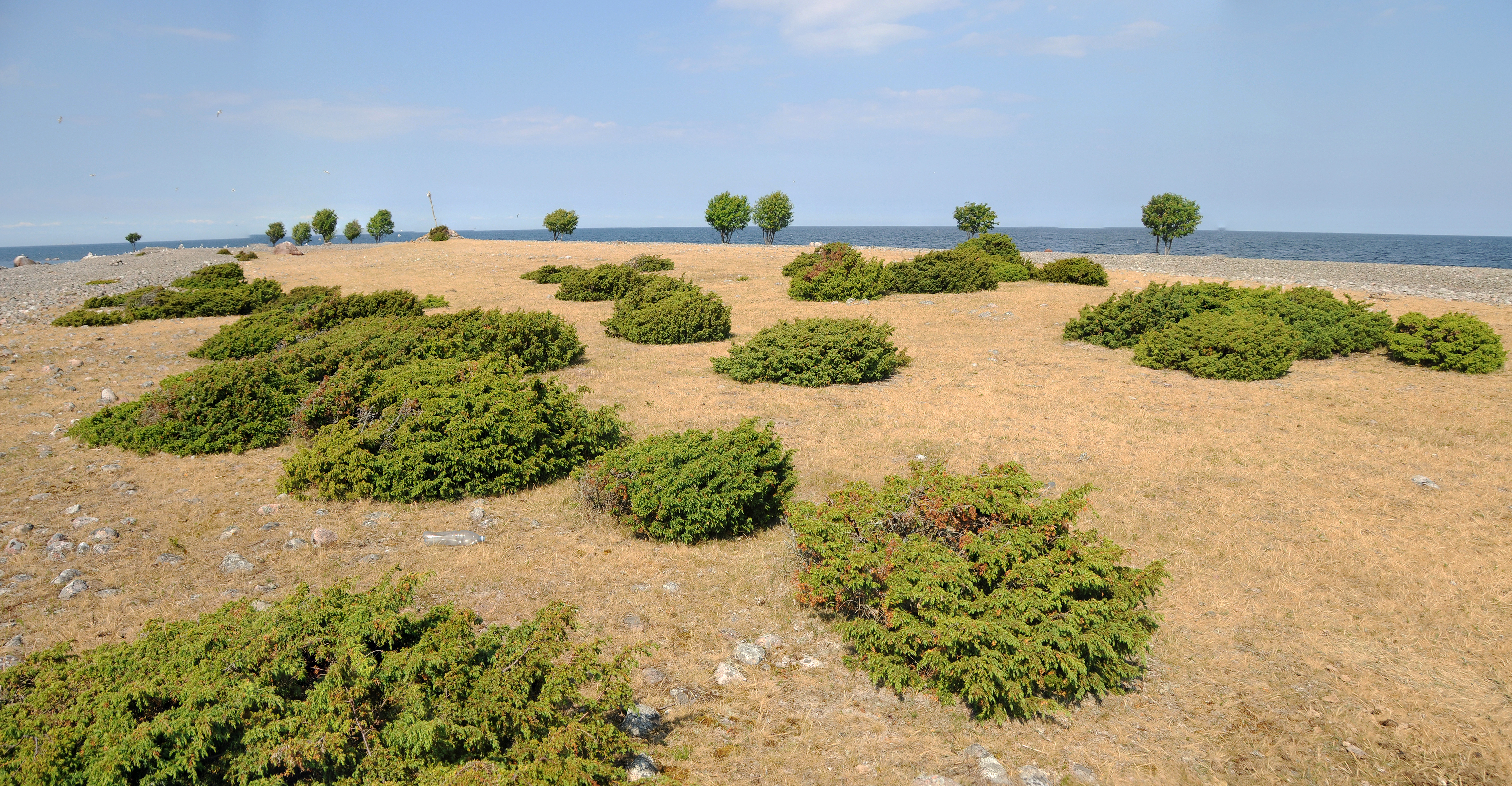 Aksi saare loodeots